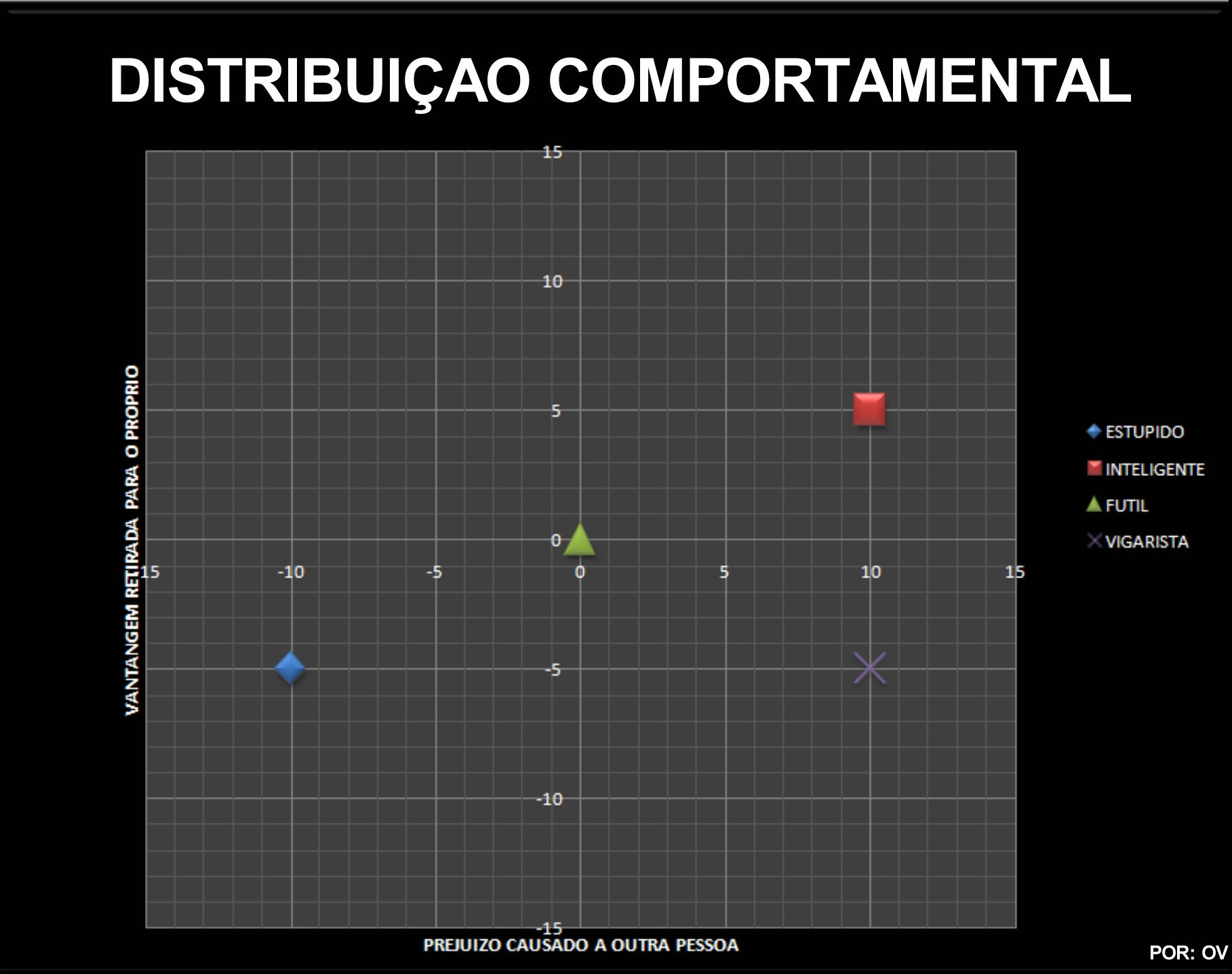 Comportamental Chart